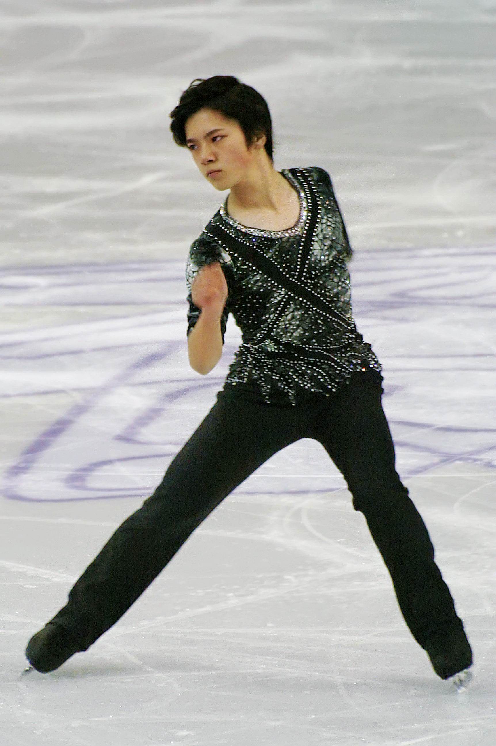 Сёма Уно (Япония) на финале Гран-при по фигурному катанию 2015-2016.